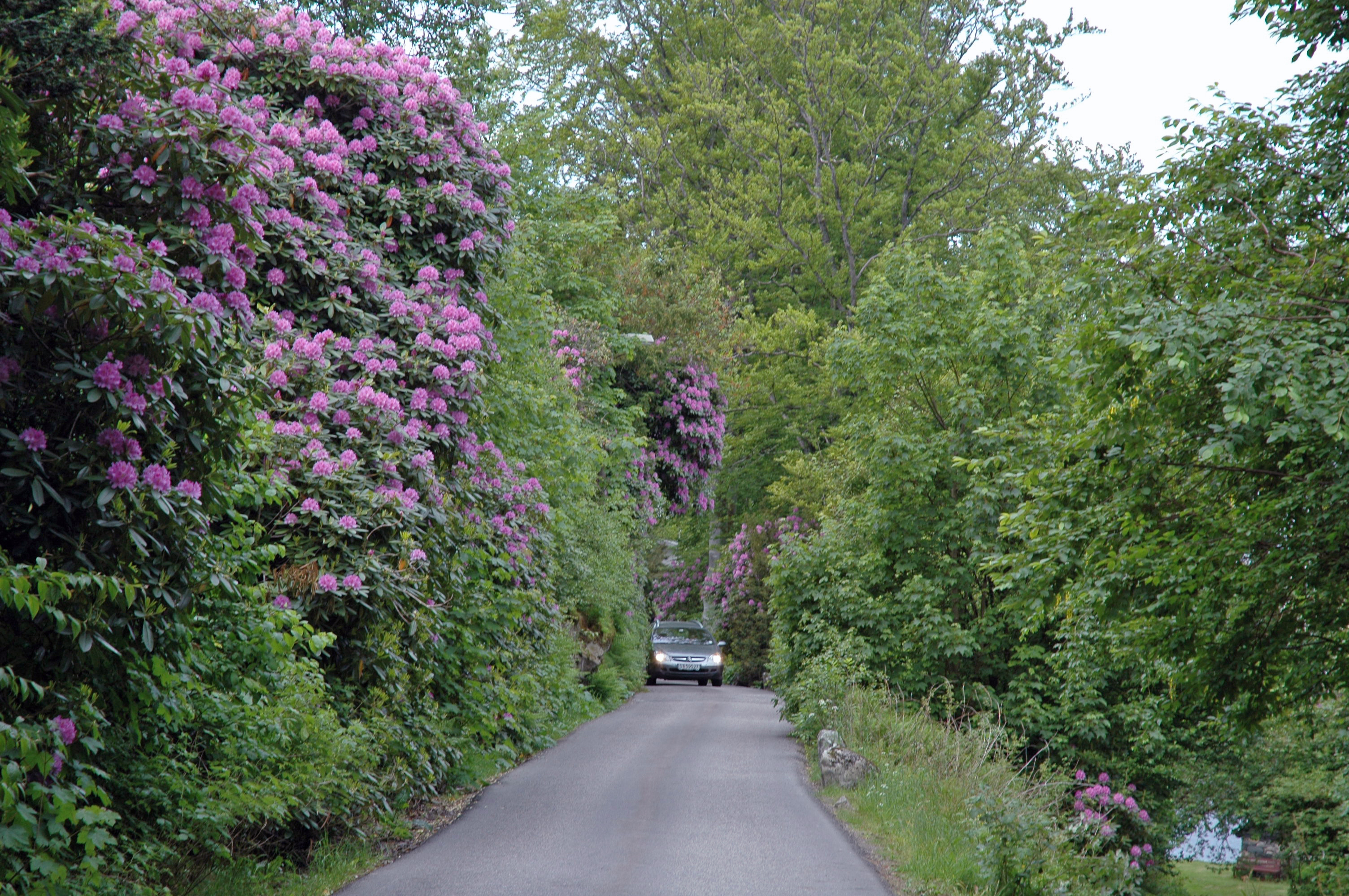 Blomstring i 2006